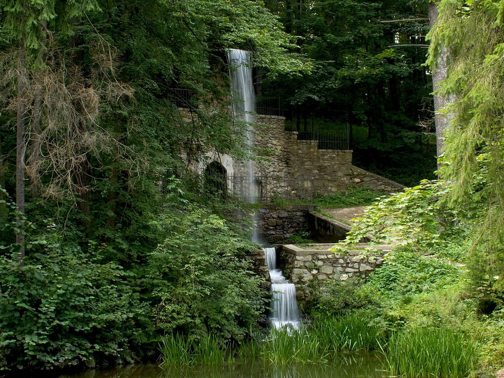 alrededores del Palacio de Betliar